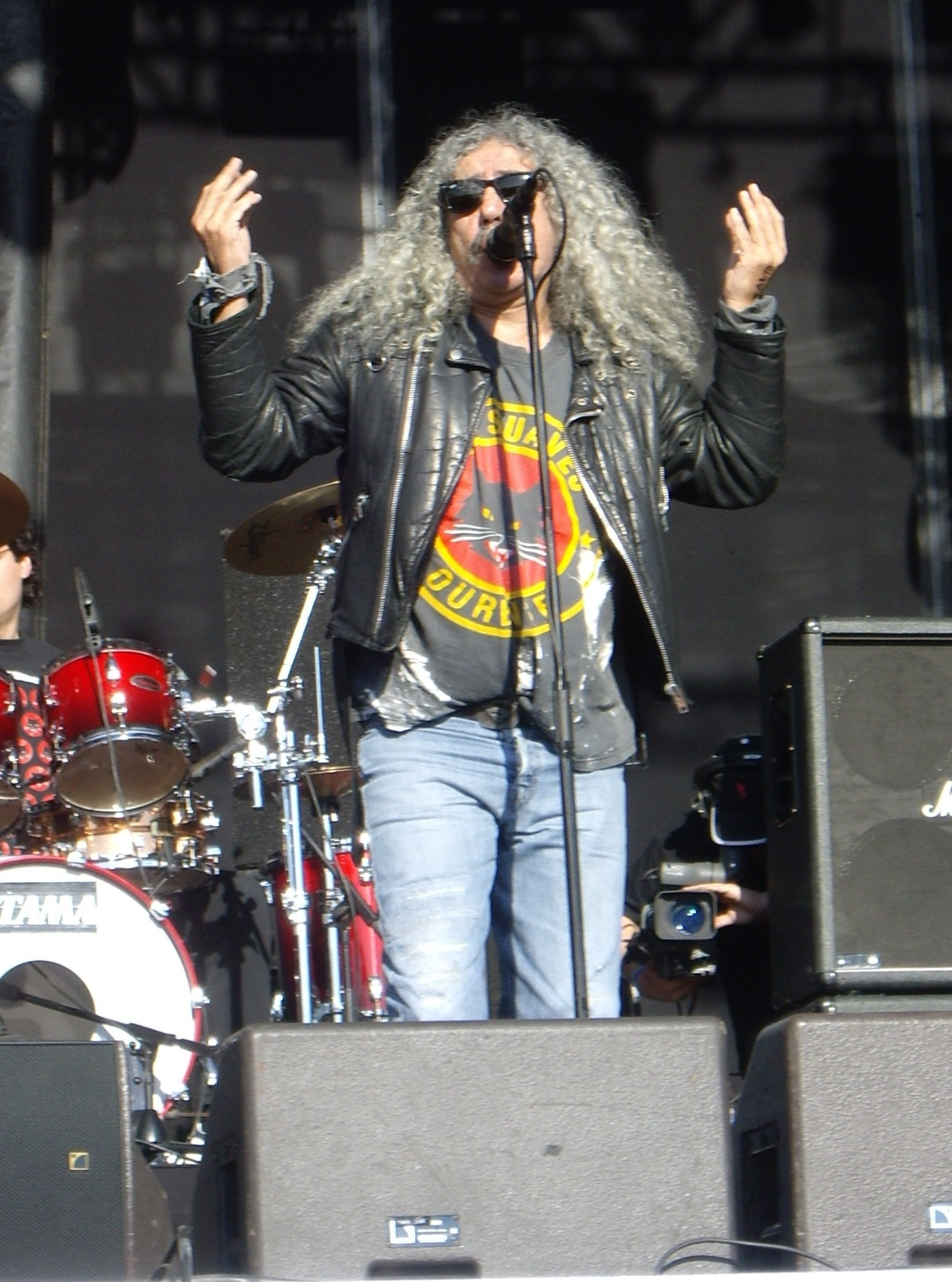 Yosi Domínguez, vocalista de Los Suaves, durante la actuación de la banda en el Viñarock 2009